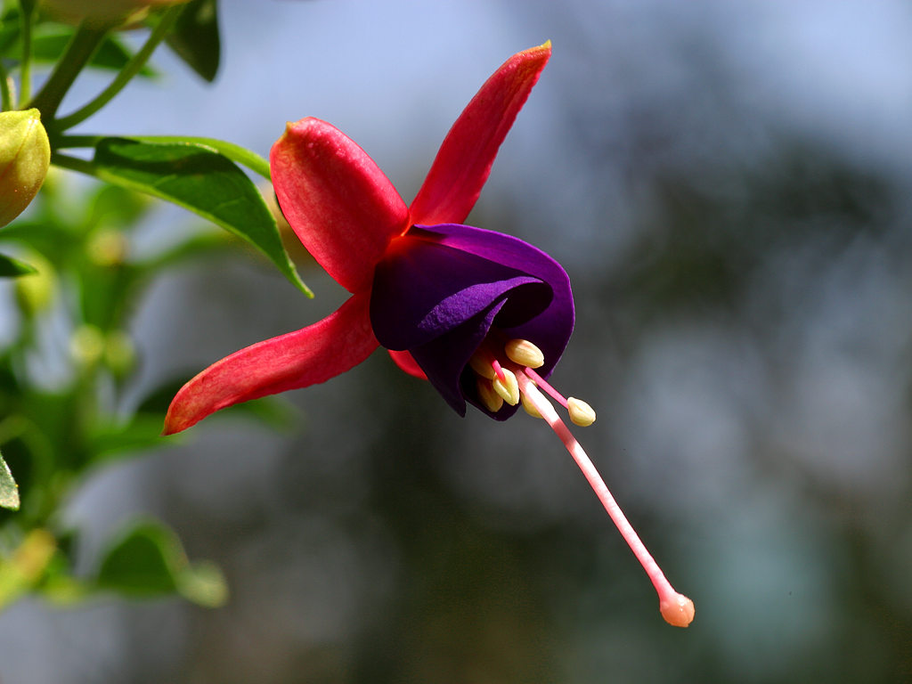 Titel: Nahaufnahme einer Fuchsie-Blüte